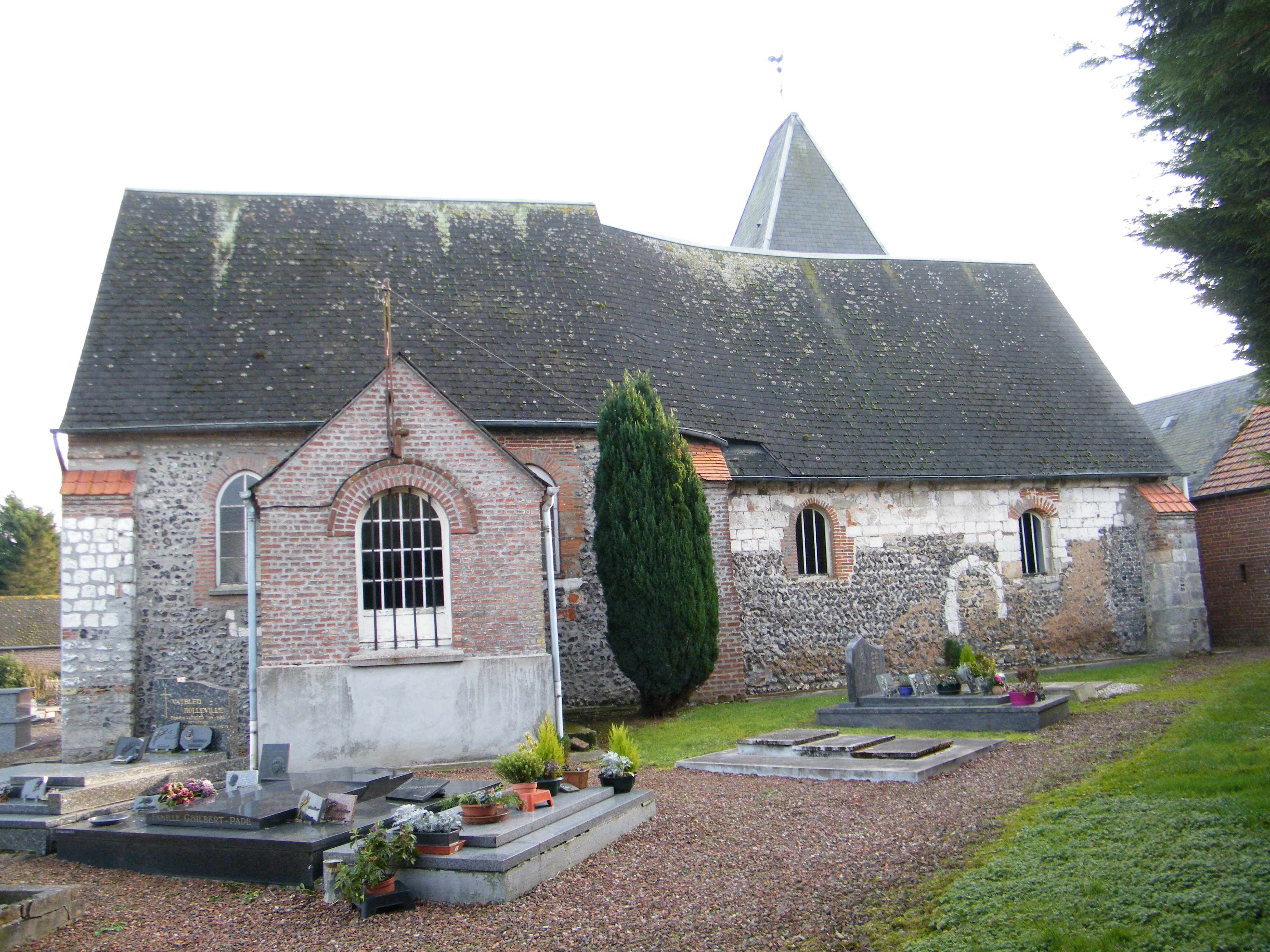 église.